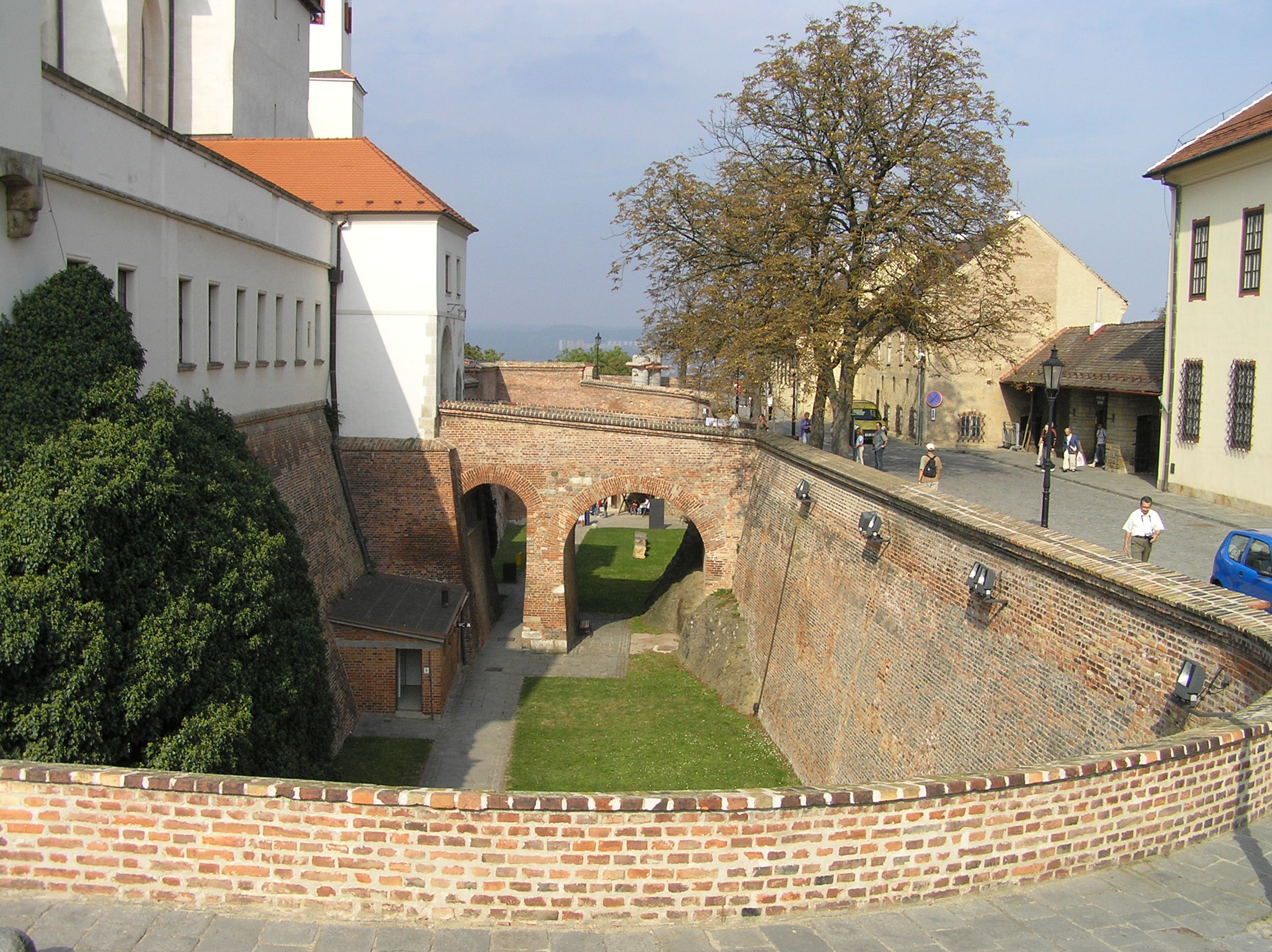 Twierdza Spielberg w Brnie